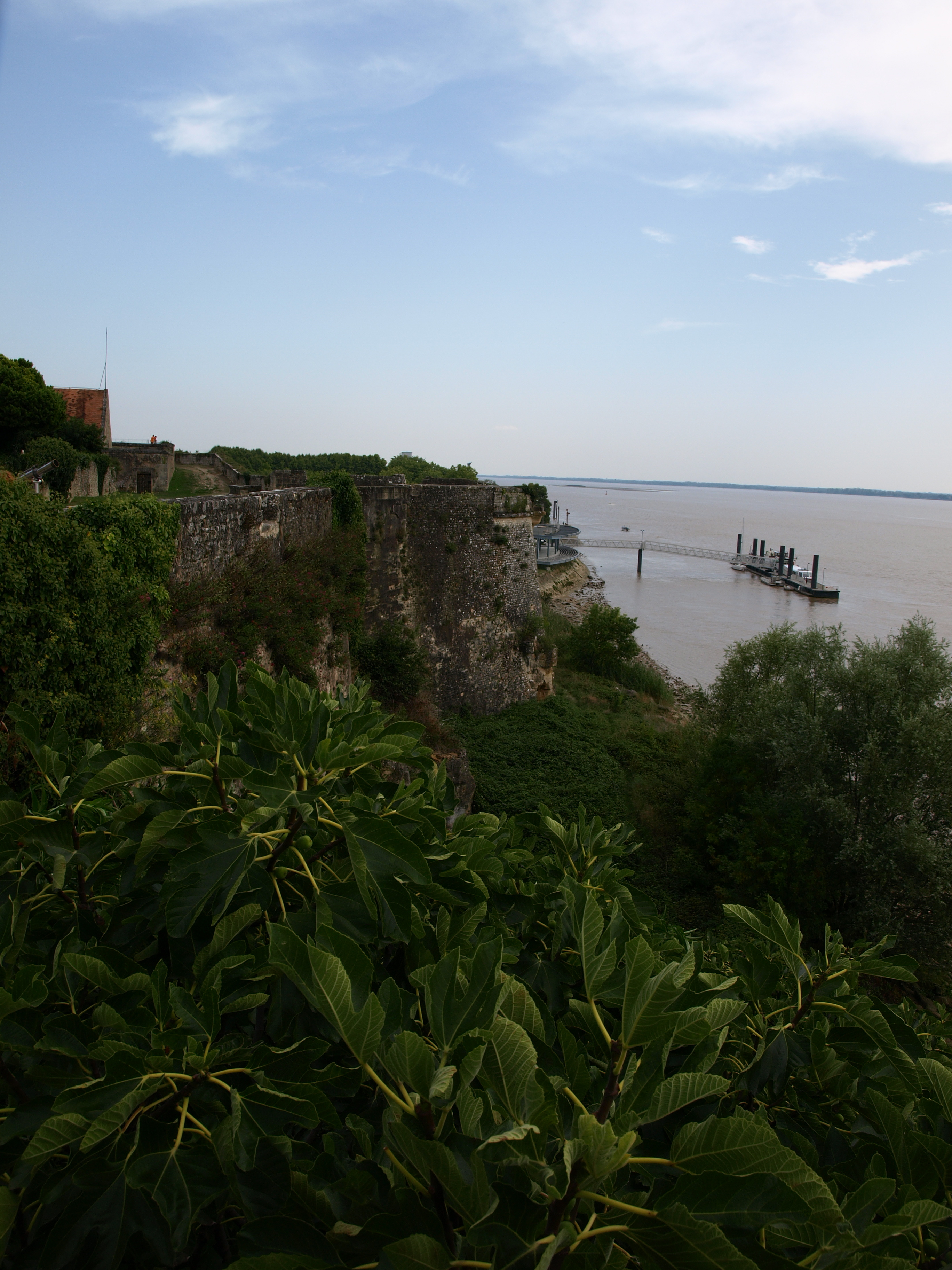 La citadelle de Blaye en Gironde, conçue par Vauban .